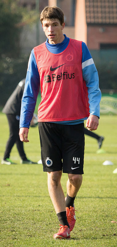 Brandon Mechele, speler van Club Brugge